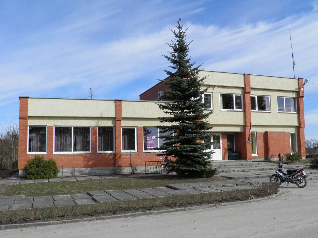 Здание самоуправления